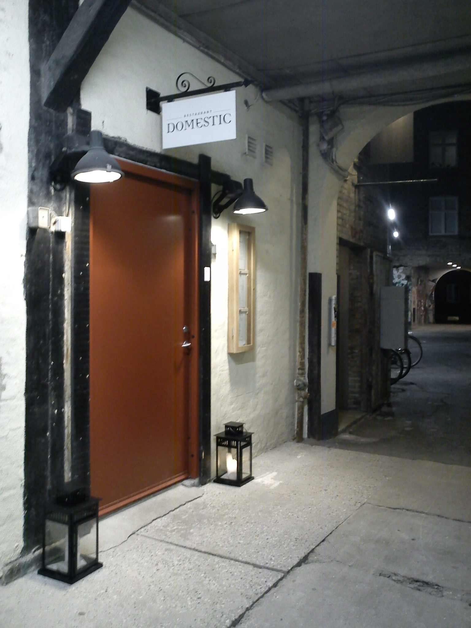 Restaurant Domestic i en baggård i Mejlgade, Aarhus. Gourmet locavore stil ala Ny Nordisk.